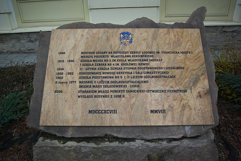 II LO Sanok tablica w setną rocznicę powstania szkoły 1898-2008